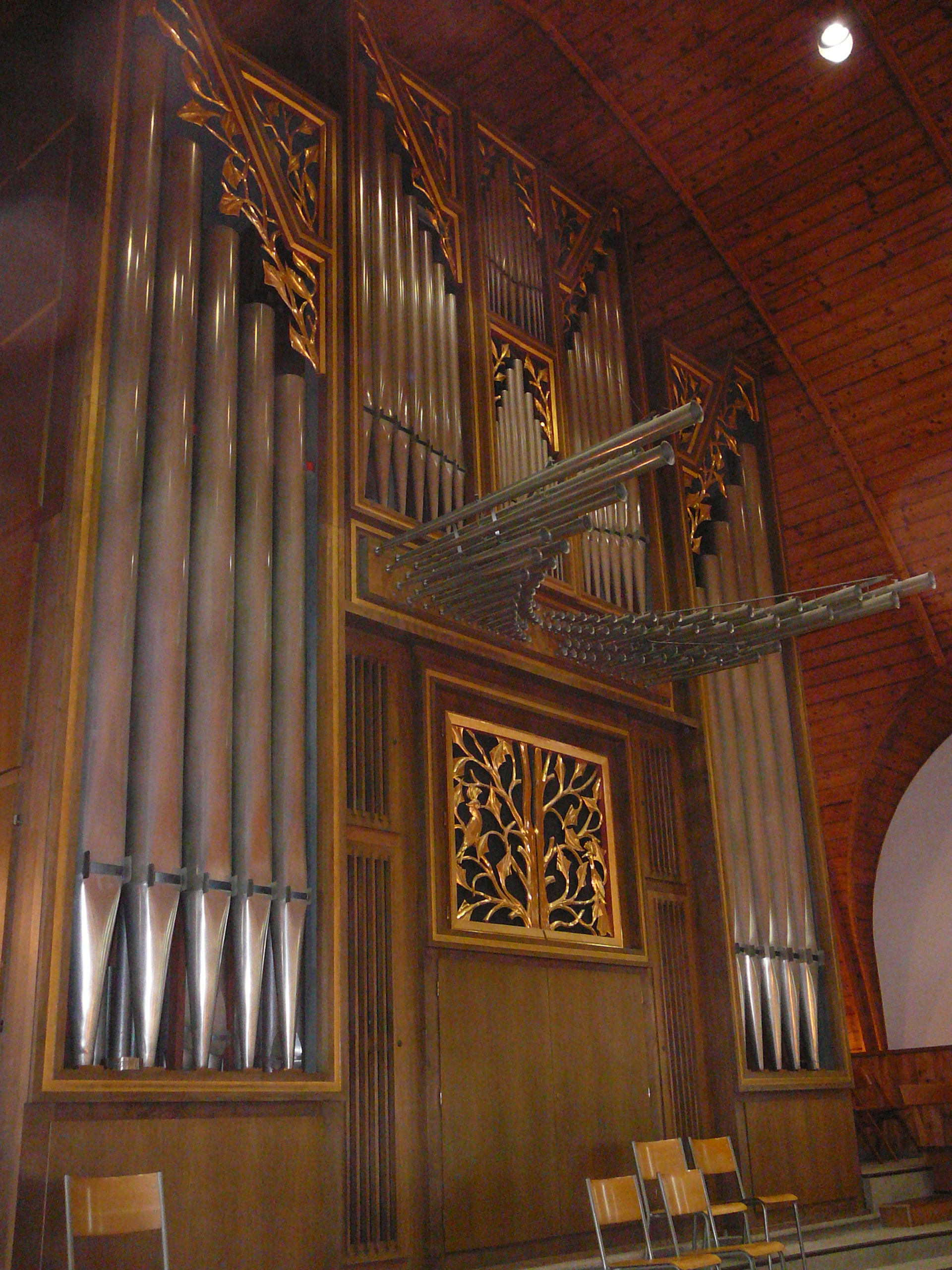 Römisch-katholische Kirche Herz Jesu Oerlikon, Orgel